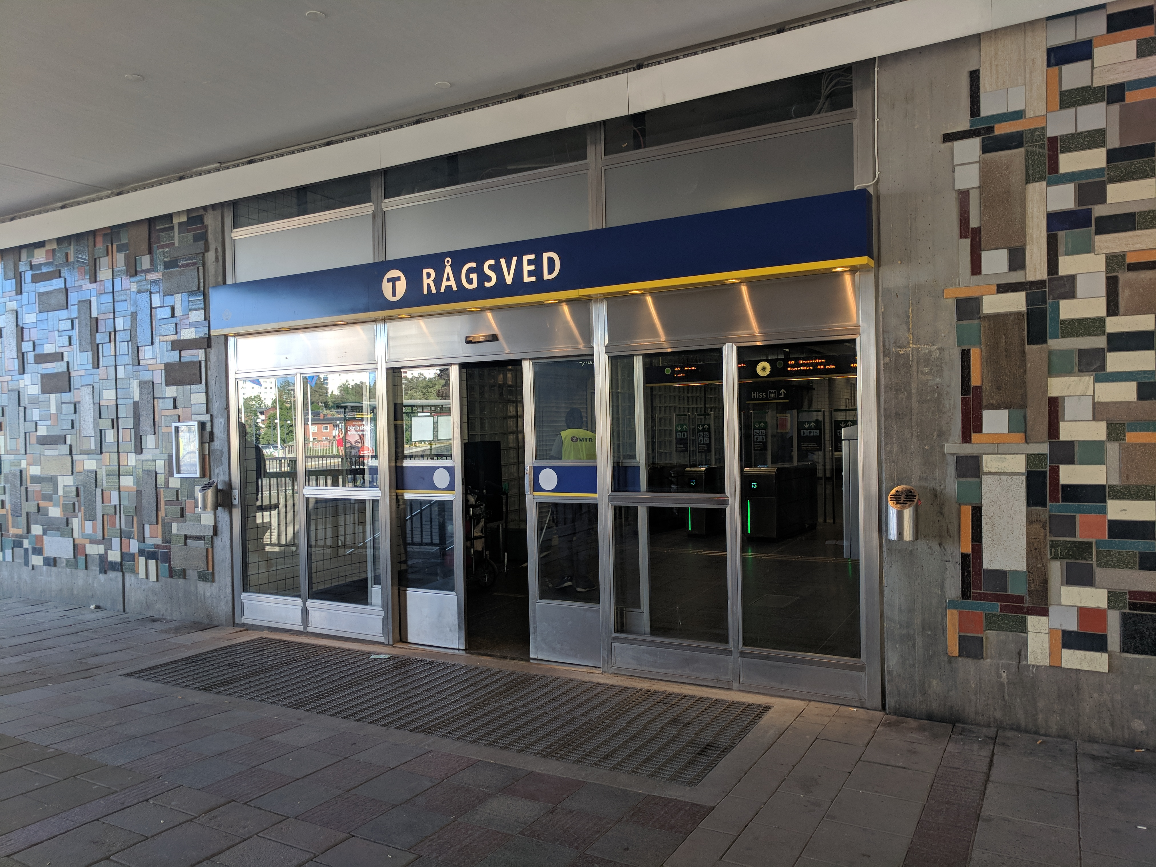 Rågsved tunnelbana